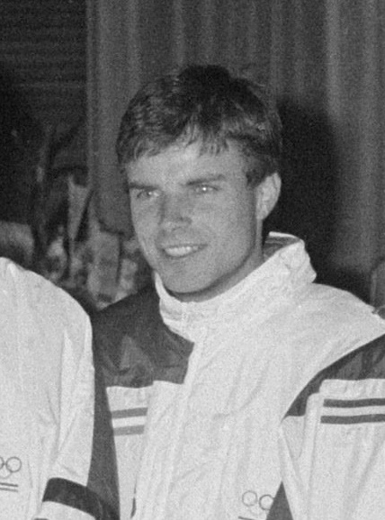 Menno Boelsma